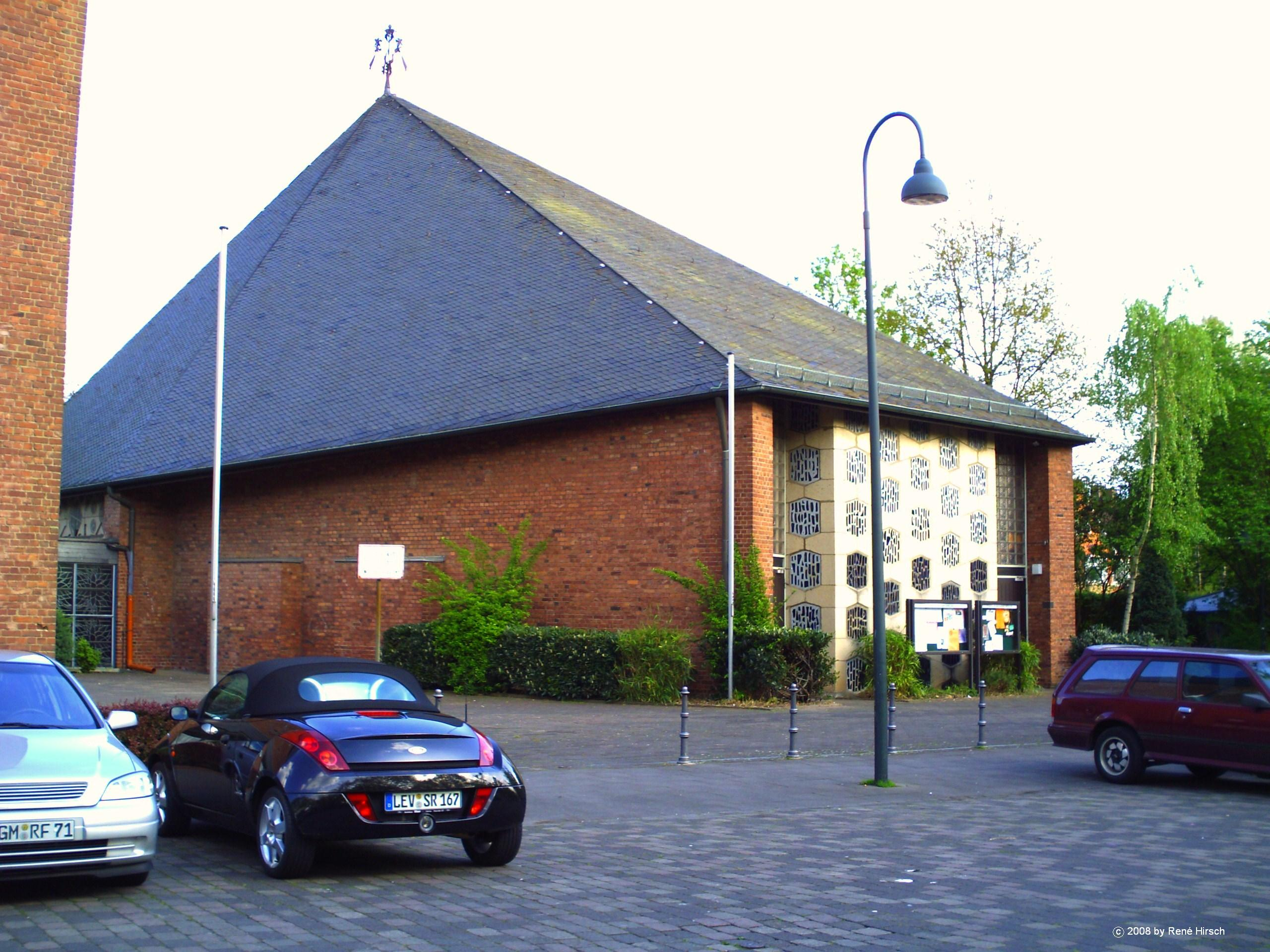 kath.Pfarrkirche St. Hildegard in Leverkusen-Wiesdorf